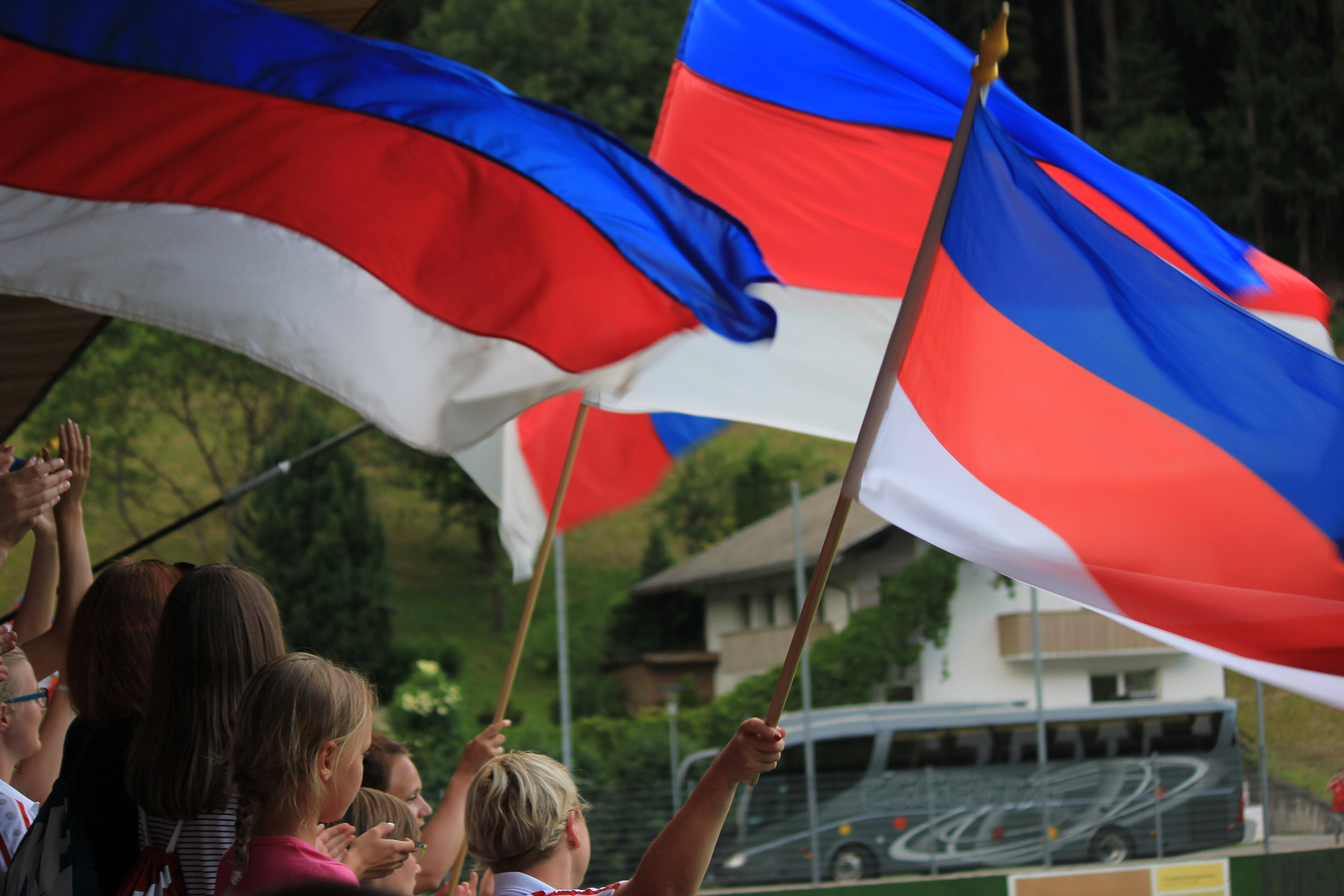 Hornjoserbsce: Serbske chorhoje při hrě wubranki w Južnym Tirolu.